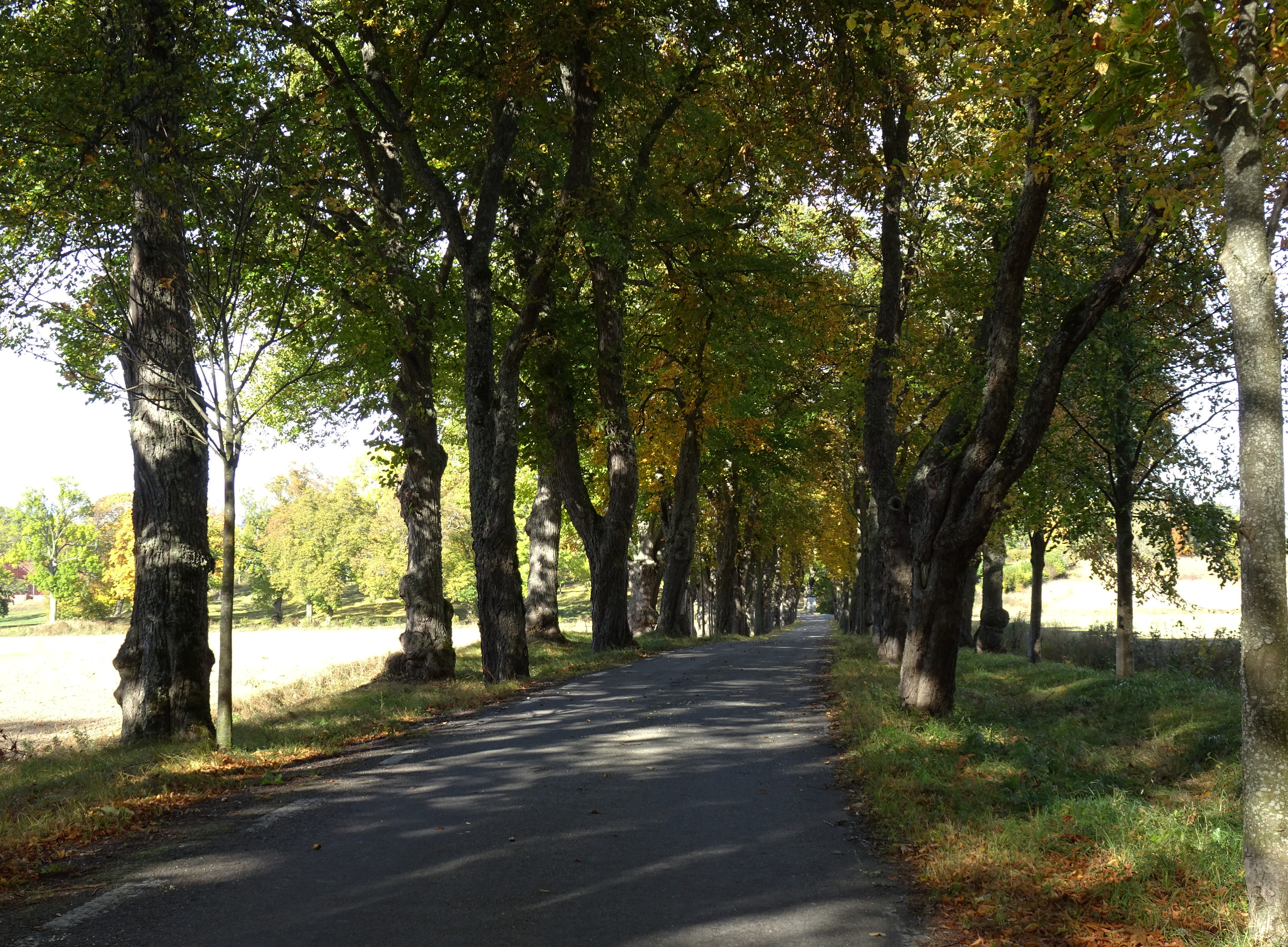 Lövsta gård, allé